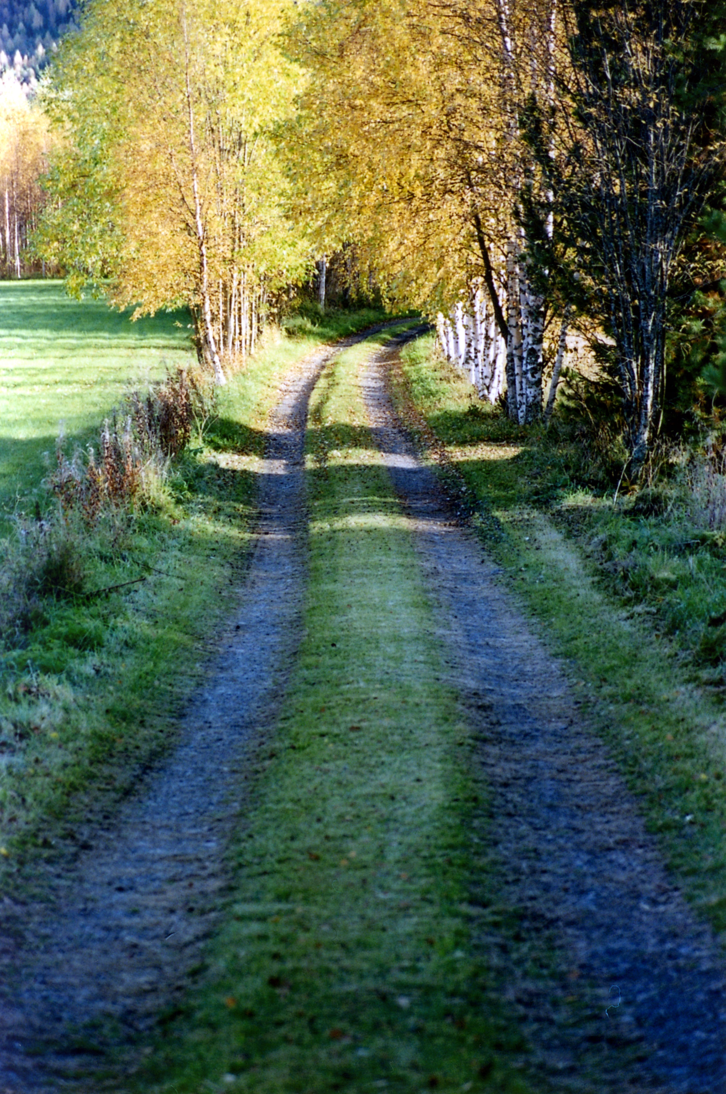 Sommarväg i Ammer/Krångede utanför Hammarstrand/Jämtland/Sverige